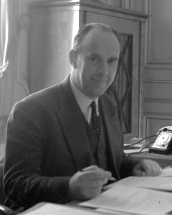 Photo de monsieur Depoid